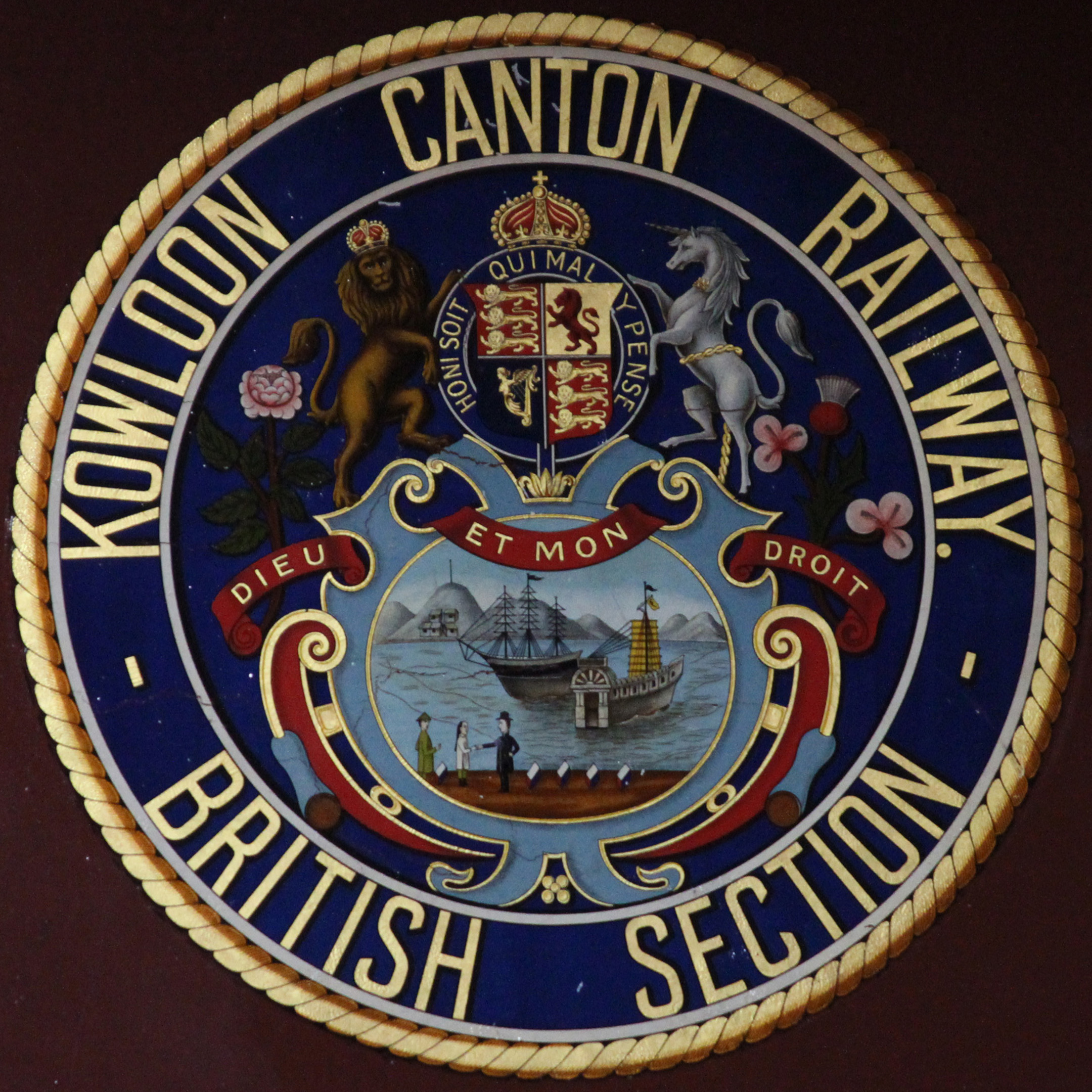 九廣鐵路英段管理局標誌（1910年至1941年）